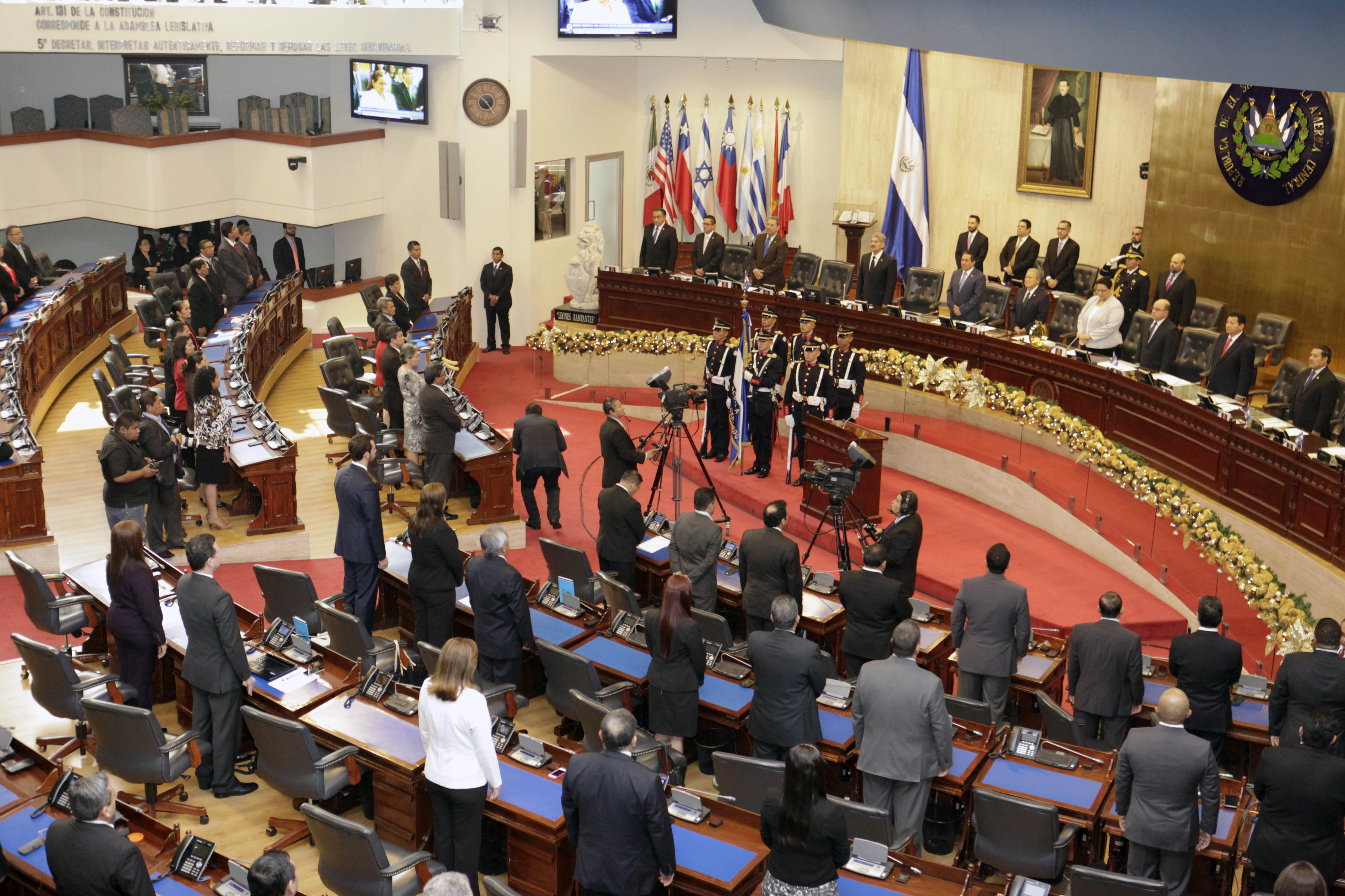 PRESIDENTE SANCHEZ CEREN ASISTIO AL 32 ANIVERSARIO DE LA CONSTITUCIÓN DE LA REPUBLICA.